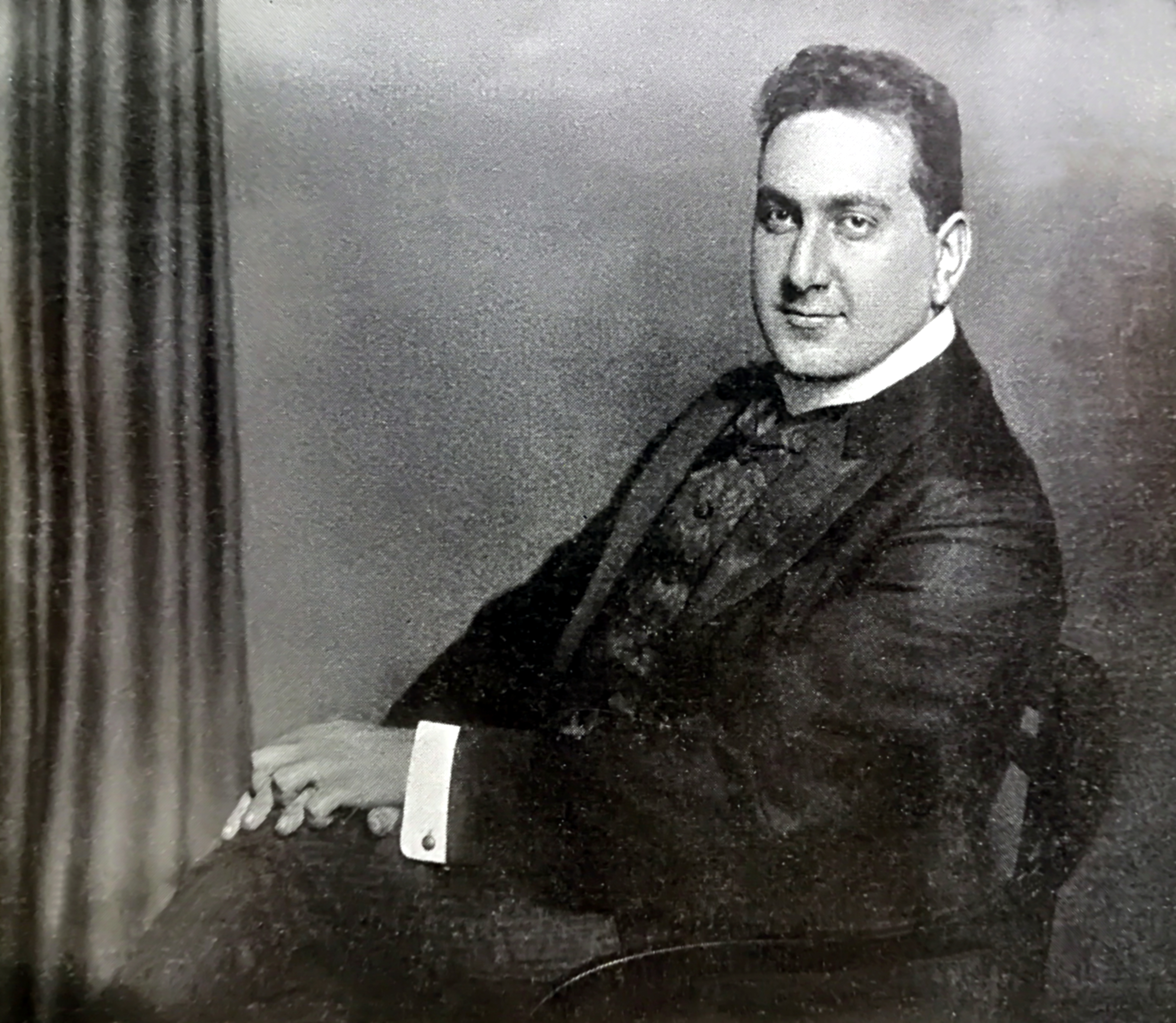 Télémaque Lambrino (Aufnahme um 1909)